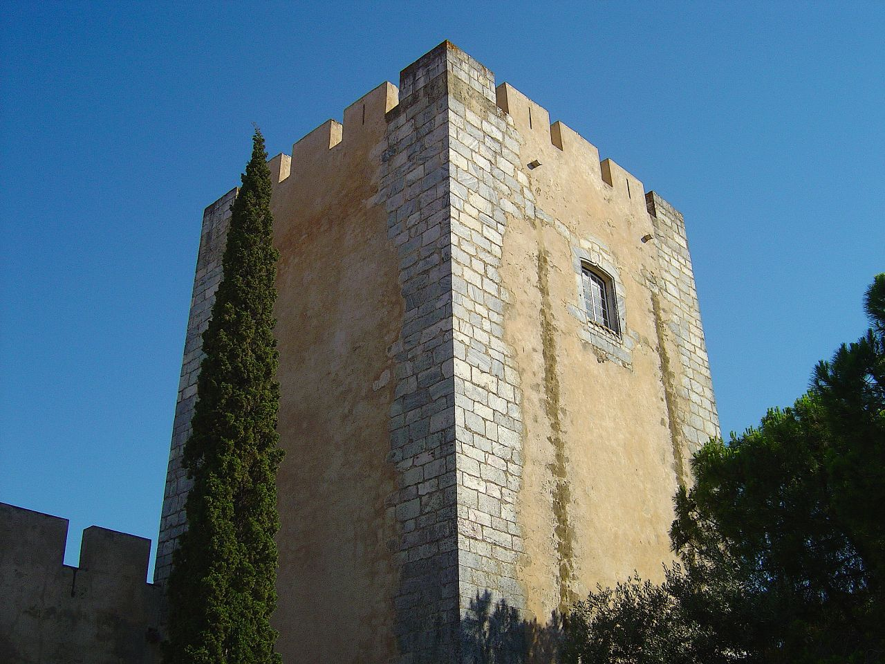 Castelo de Alvito - Portugal